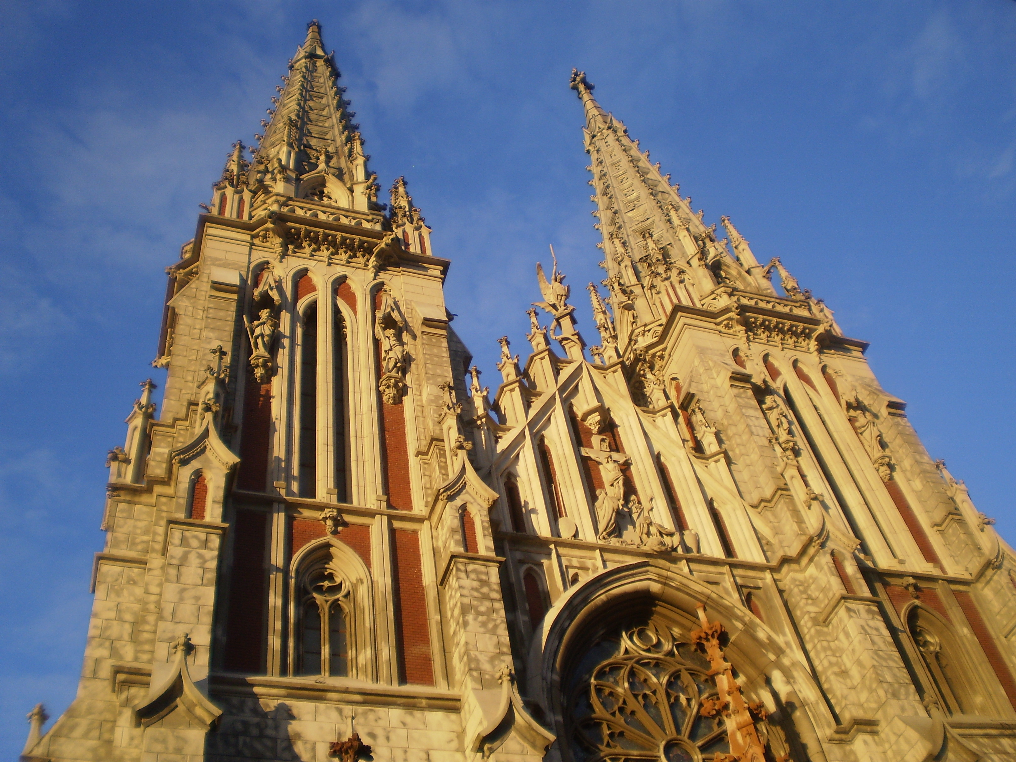 Костьол св. Миколая, Київ, Червоноармійська вул., 77